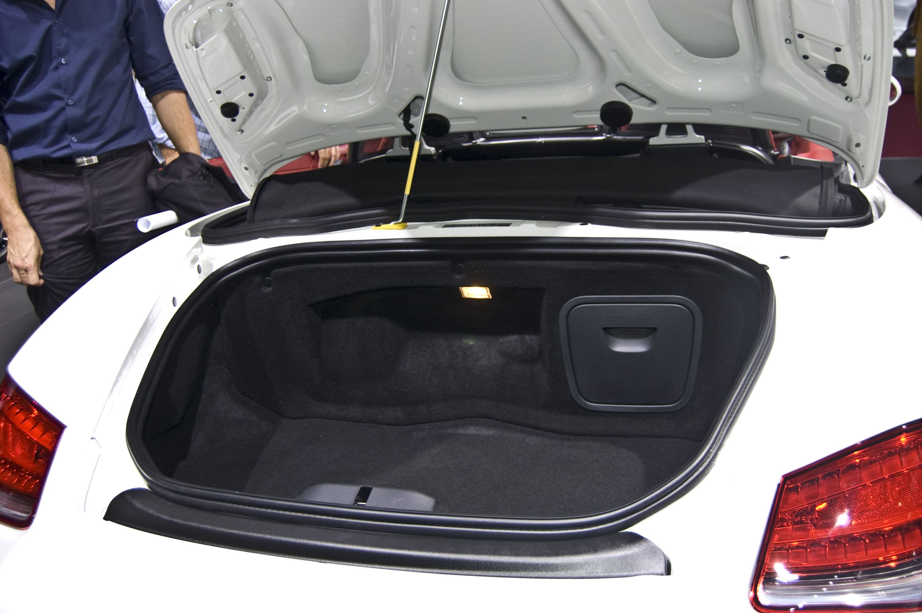 Porsche Boxster Spyder en el Salón de París 2010